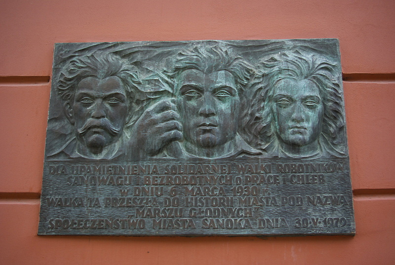 Tablica upamiętniająca protest robotnikąw pod nazwą "Marsz Głodnych" z dnia 6 marca 1930, odsłonięta 30 maja 1970